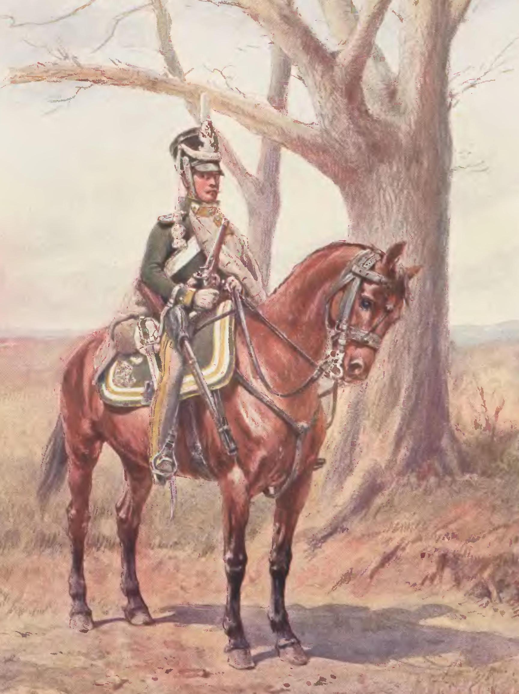 Strzelec konny gwardii 1815-1822